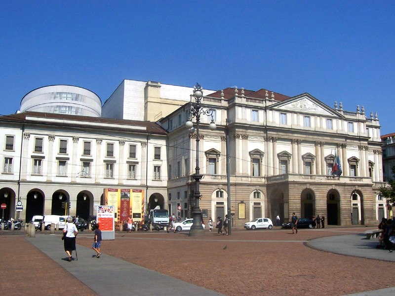 Milano - il Teatro alla Scala e a sinistra l'edificio che ospita il Museo del Teatro della Scala, progettato dall'architetto di corte Giacomo Tazzini nel 1831.